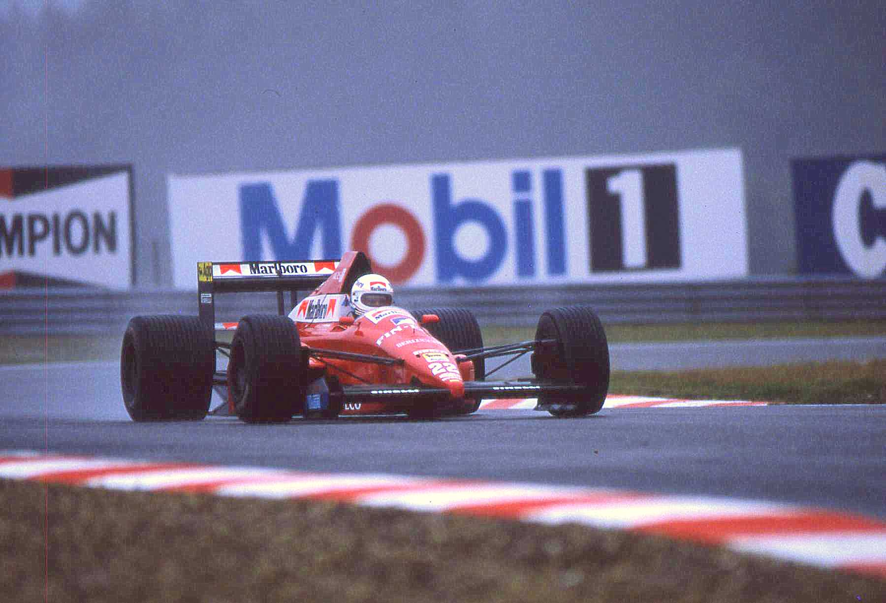 Andrea de Cesaris - BMS Dallara-Ford (scan diapo )